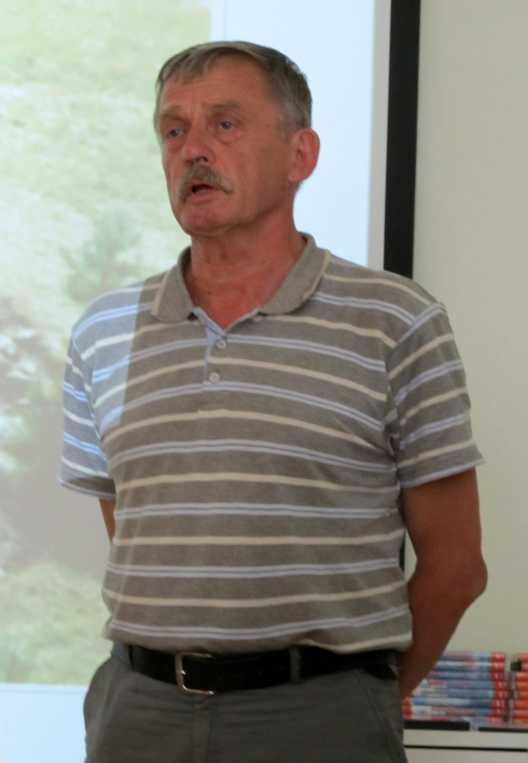 Mati Mandel, eesti arheoloog ja ajaloolane